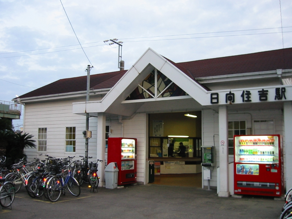 日向住吉駅 2006年3月21日 利用者本人撮影